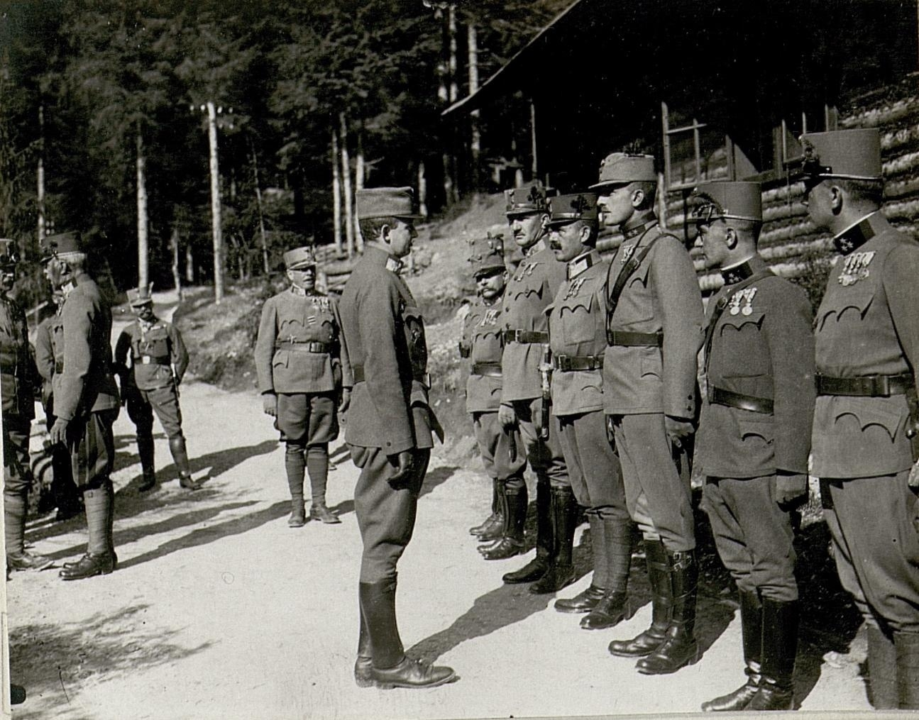 Besuch Sr.Majestät Kaiser Karl in Baitle